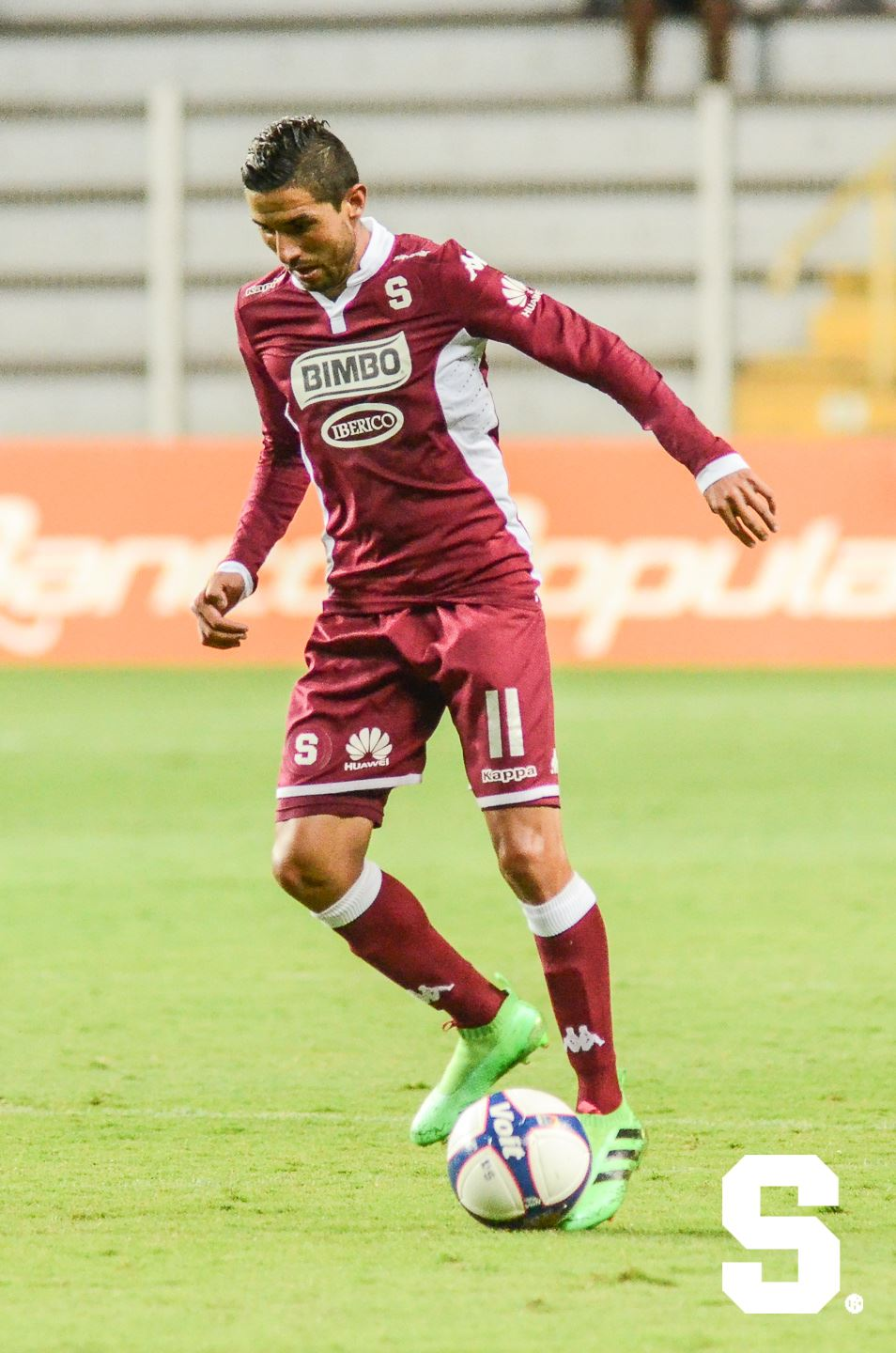 Marvin Jesús Angúlo Borbón Jugador Primera División CR Deportivo Saprissa FototomadadeDeportivoSaprissa